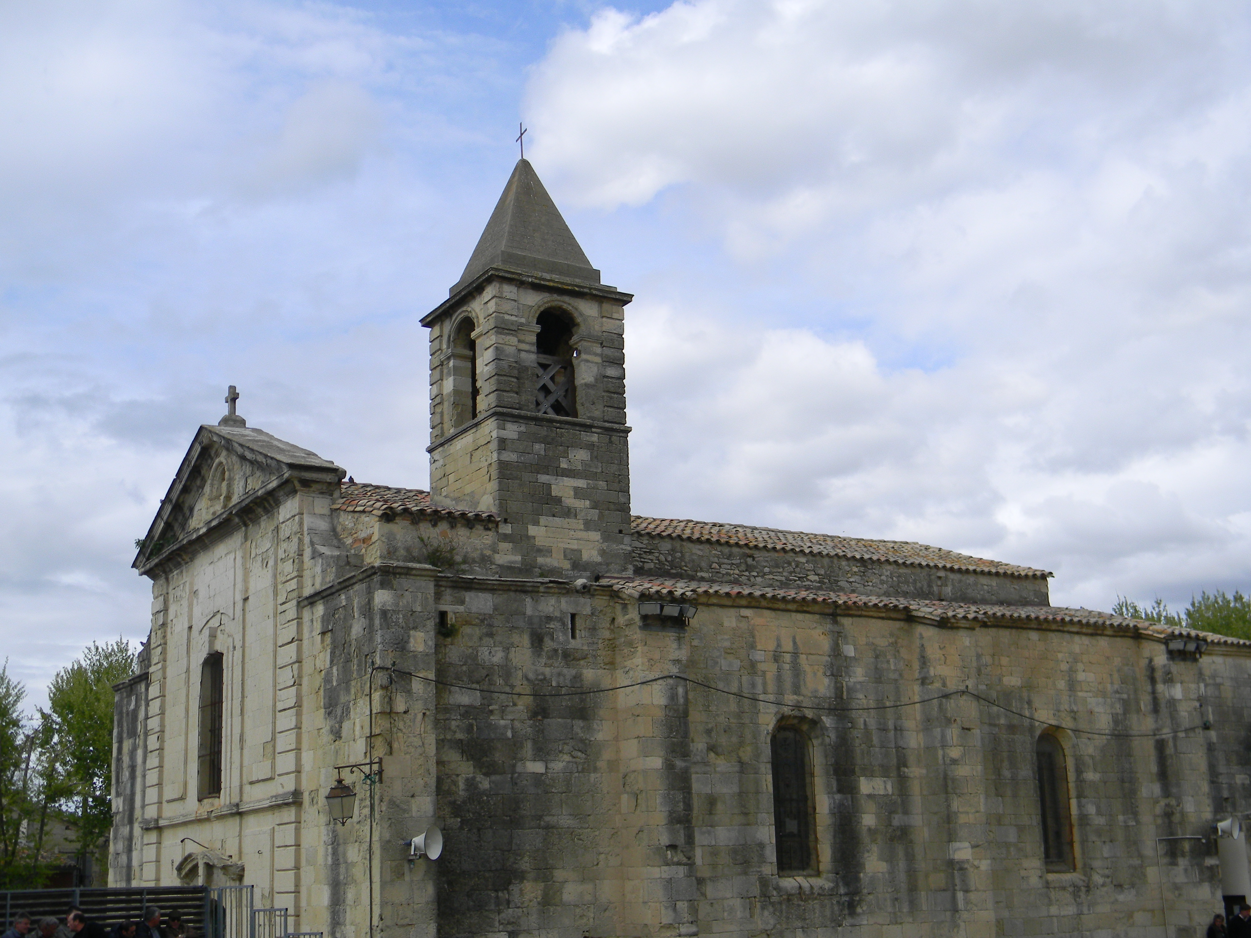 Église de Saint-Laurent-d'Aigouze.